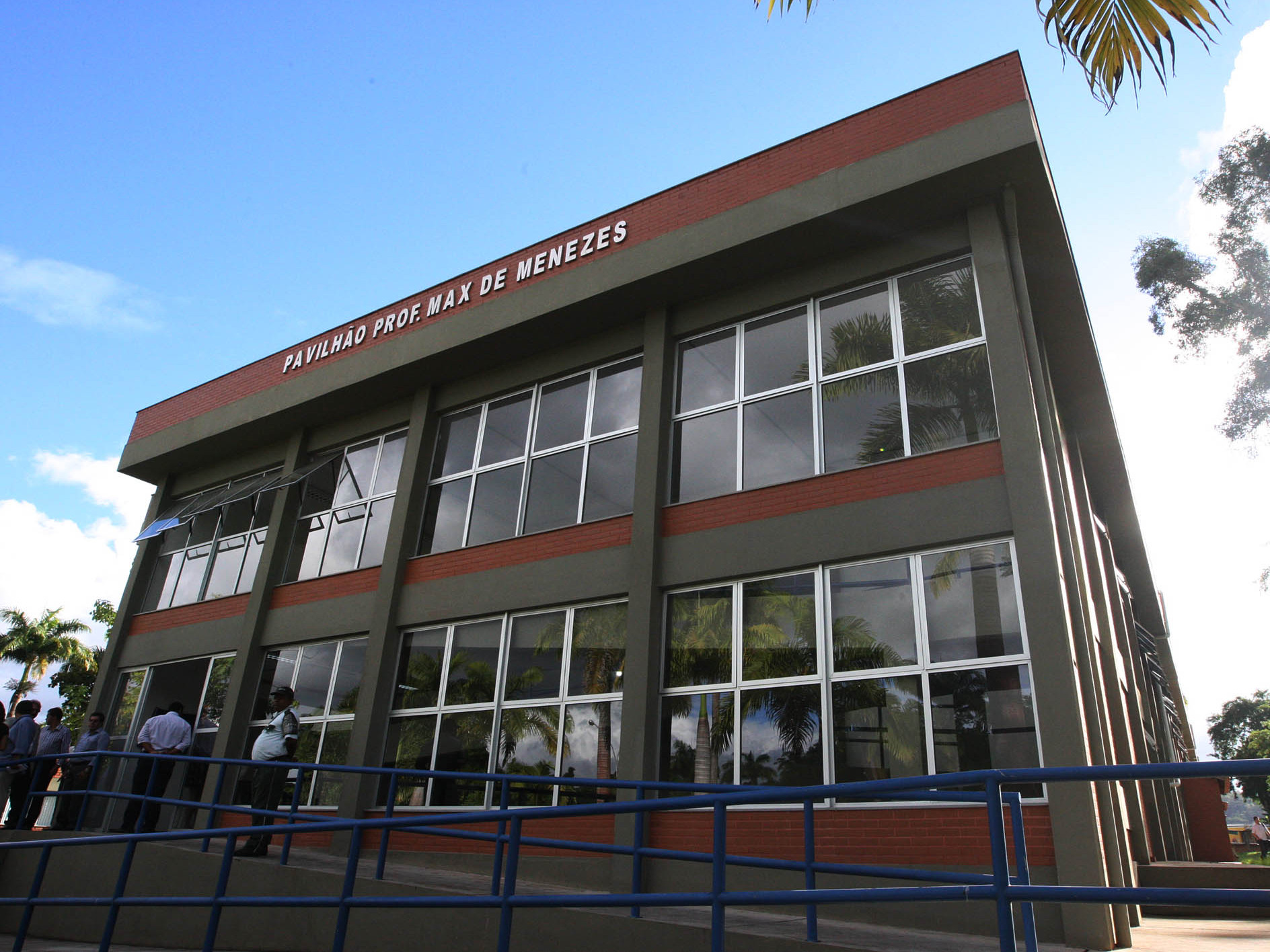 Inauguração da ampliação da UESC em Ilhéus.